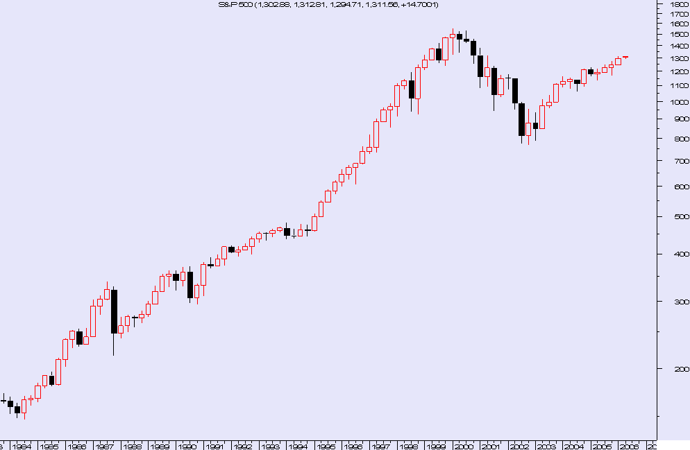 Autore: FeRR@; grafico ottenuto da Metastock, un software di analisi tecnica molto usato da professionisti del settore. Il grafico è quadrimestrale dell'indice americano S&P500.